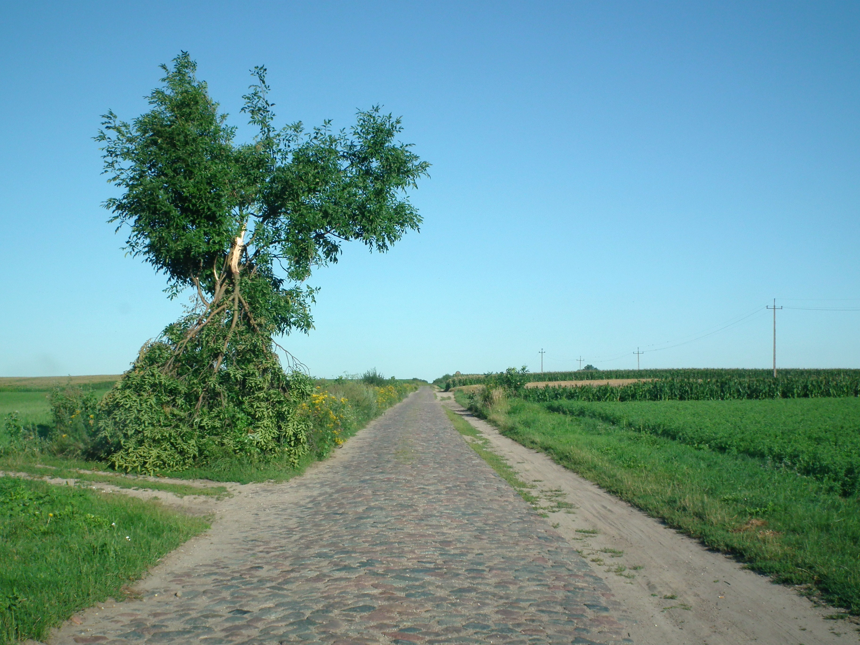 Droga brukowana z Karnówka do Kosowa koło Nakła n/N.